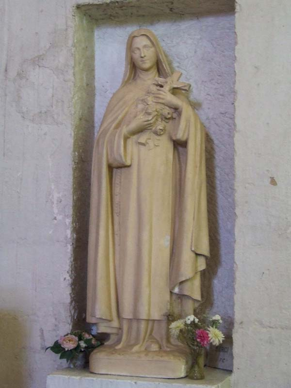 Sculpture de Sainte Thérèse de Lisieux à l'église Saint-Pierre-aux-Liens d'Étais-la-Sauvin (Yonne)